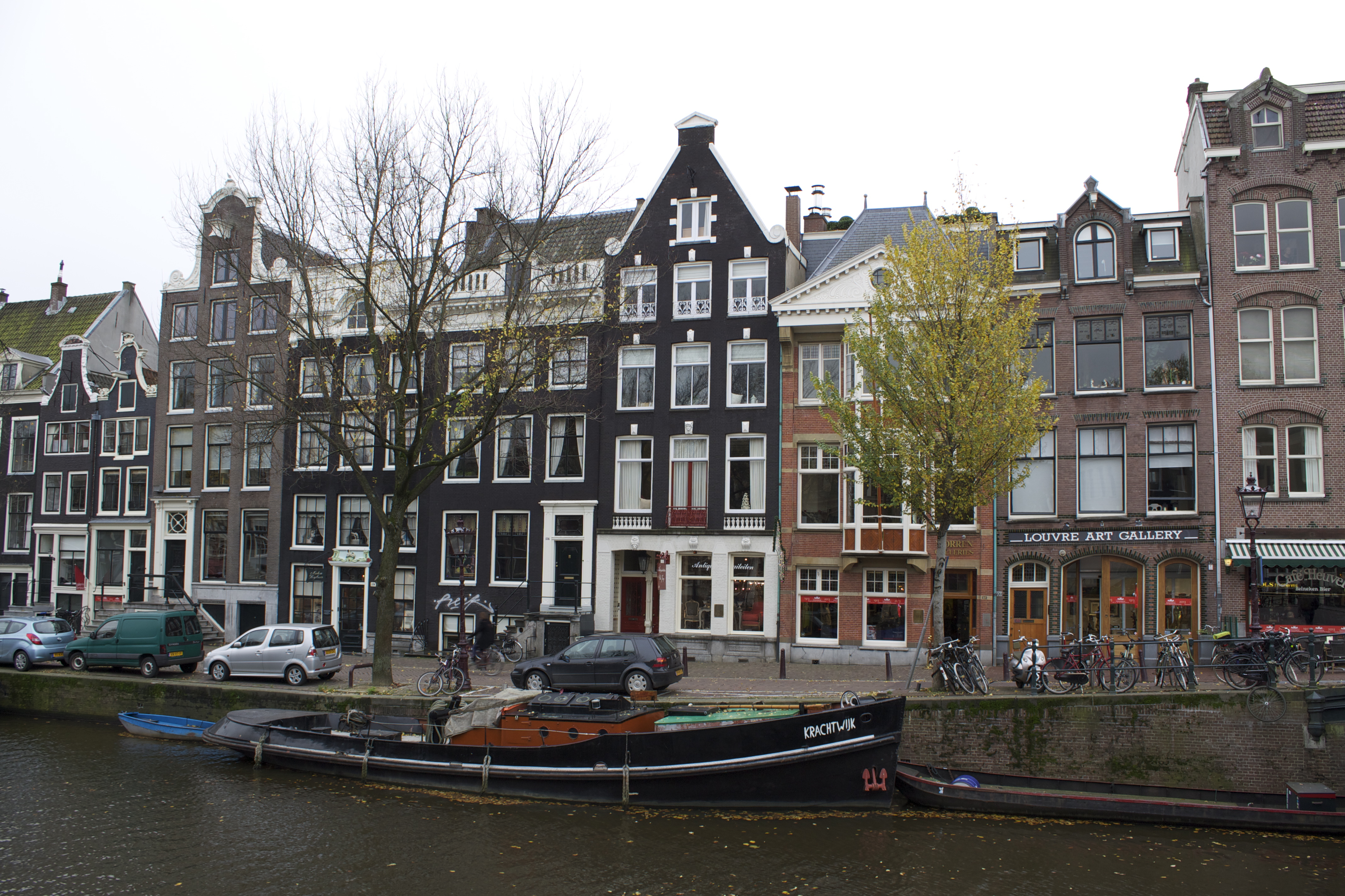 Amsterdam , Netherlands